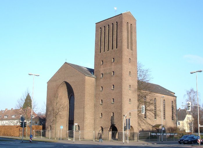 Dreifaltigkeitskirche Aussenansicht von SW